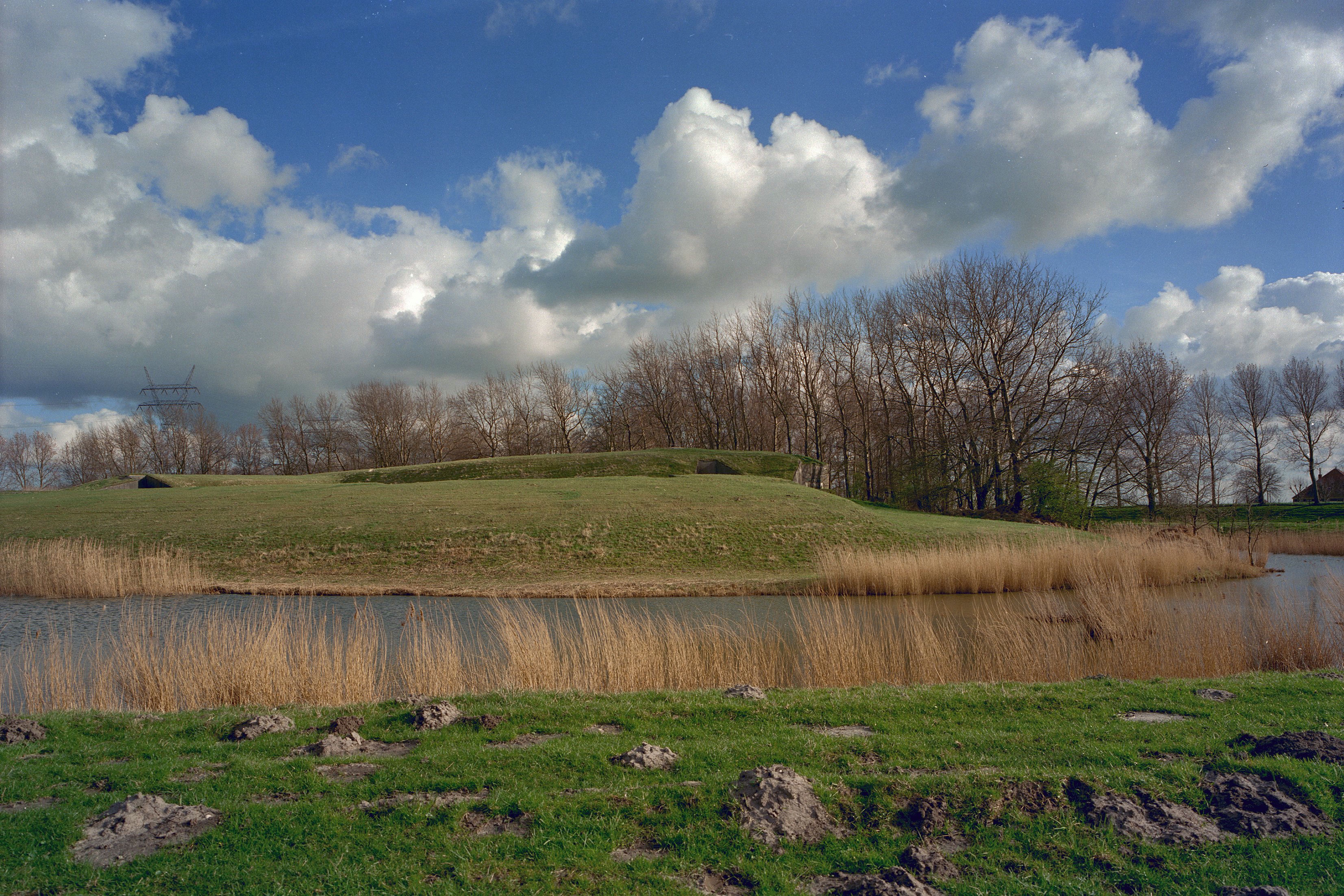 Fort Middenweg: Overzicht fort (opmerking: Werelderfgoed Beemster)